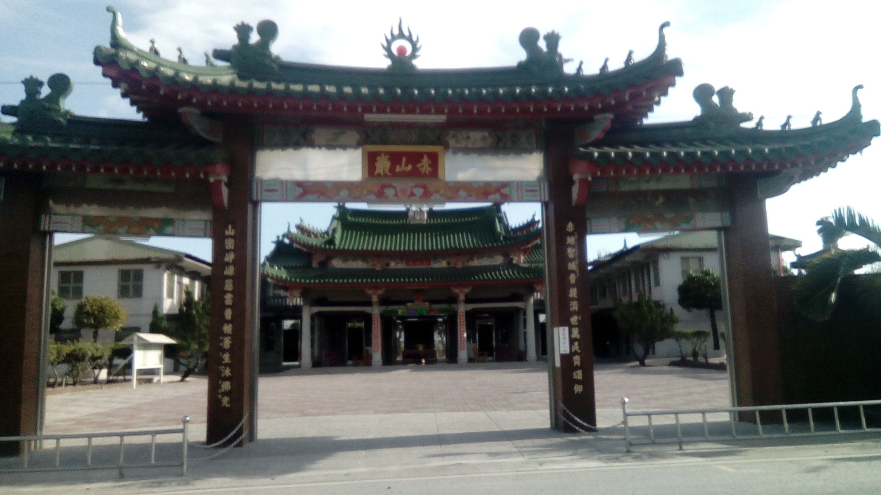 屏東縣內知名的廟宇 周邊附設納骨塔 每年逢佛祖生日 廟宇周邊有持續3天的商展 長約半公里 吸引大批人潮